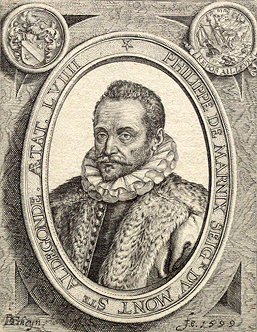 Gravure van Marnix van St. Aldegonde door Jacques de Gheyn uit 1599